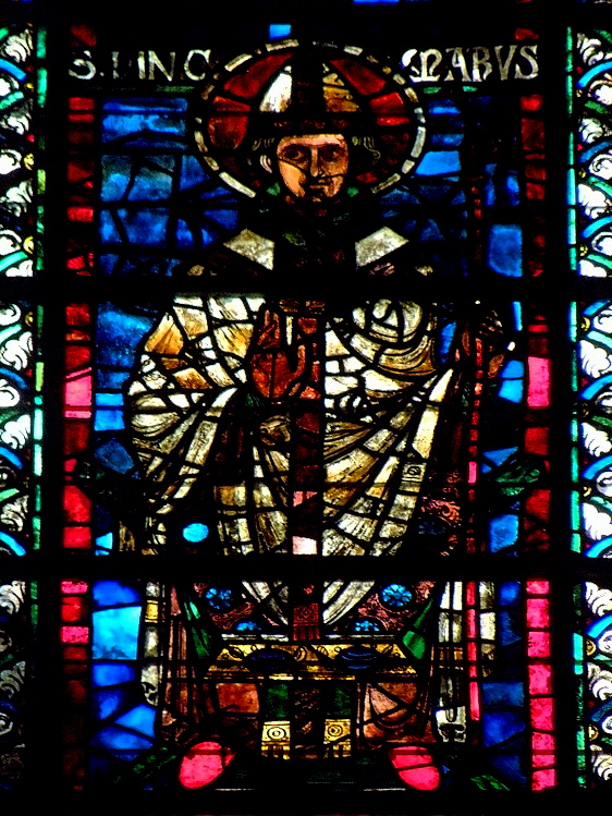 L'archevêque Hincmar. Détail de la baie 208 de la basilique Saint-Rémi de Reims (51). Localisation: fenêtre-haute méridionale du chœur de la basilique Saint-Rémi de Reims (51). Datation: 4ème quart du XIIème siècle. Description: l'archevêque Hincmar. Classement: 1er janvier 1841.